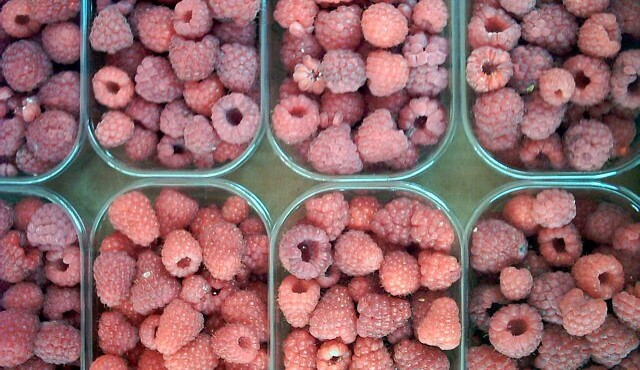 Himbeeren - Rubus idaeus - Marktware